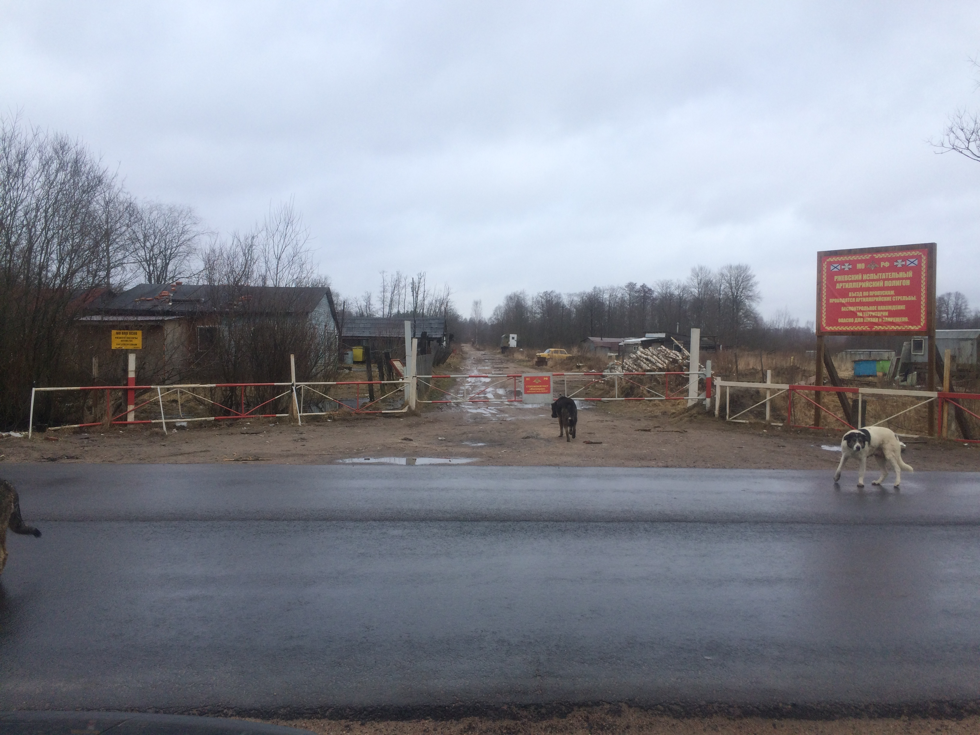 деревня Волоярви